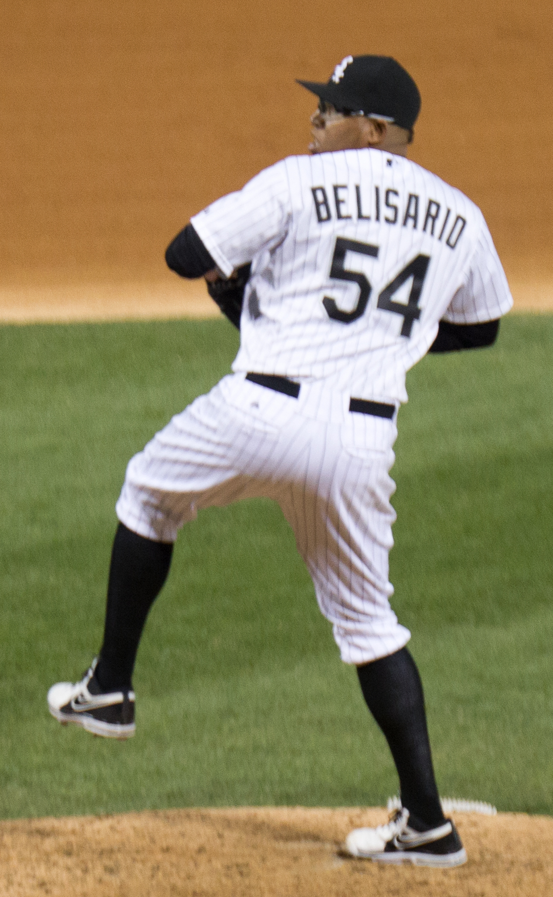 Ronald Belisario